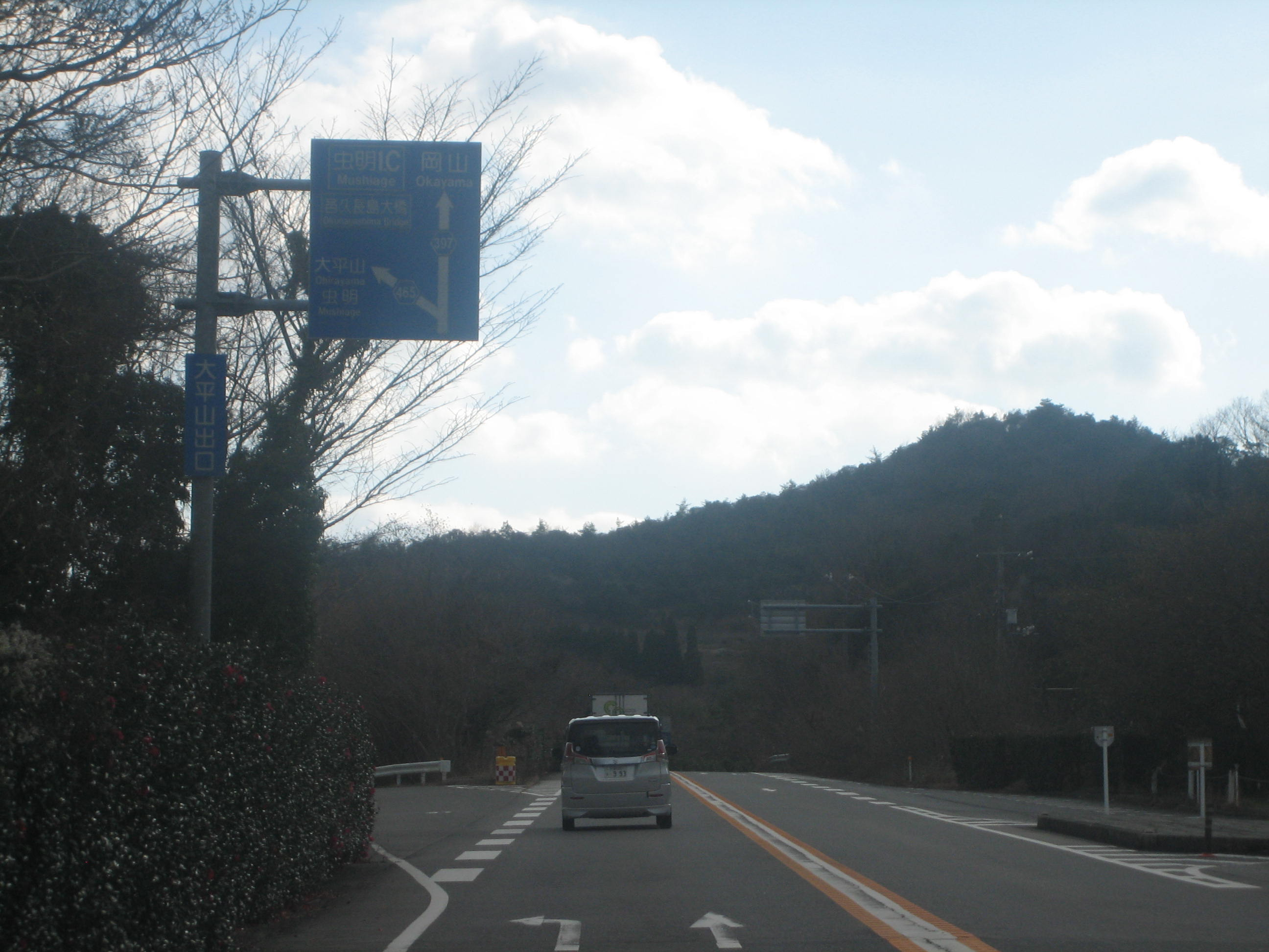 大平山ICの出口